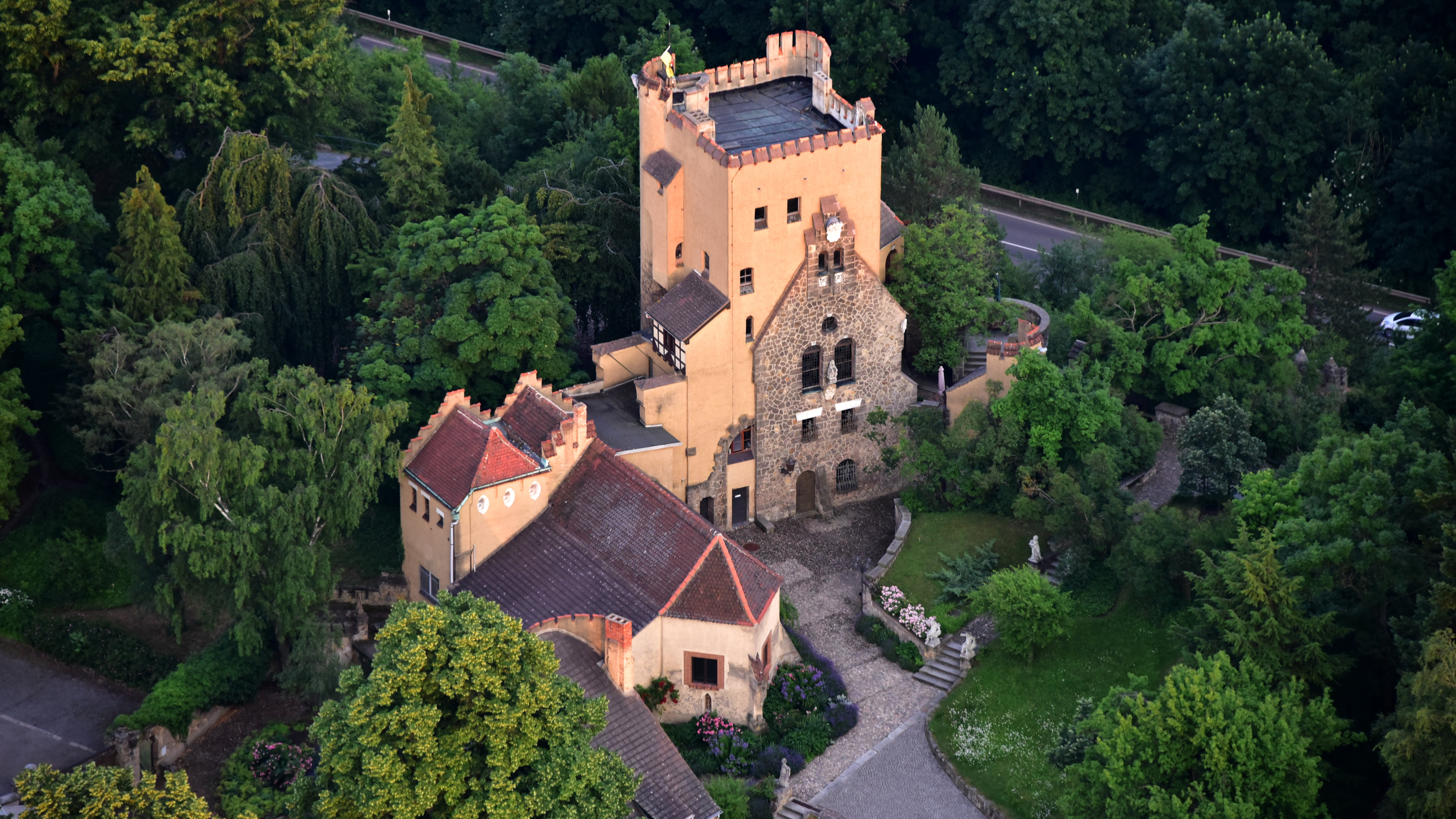 Roseburg (Schloss), Luftaufnahme (2017)